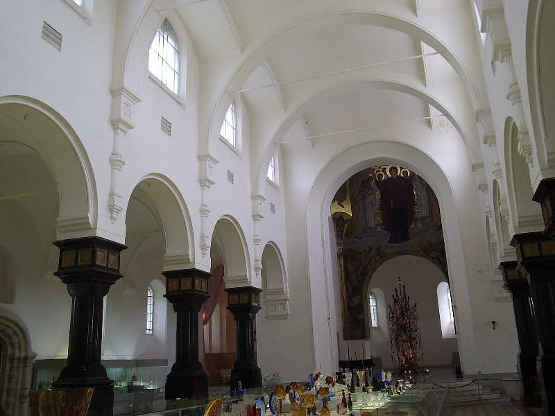 Георгиевский собор (внутри)